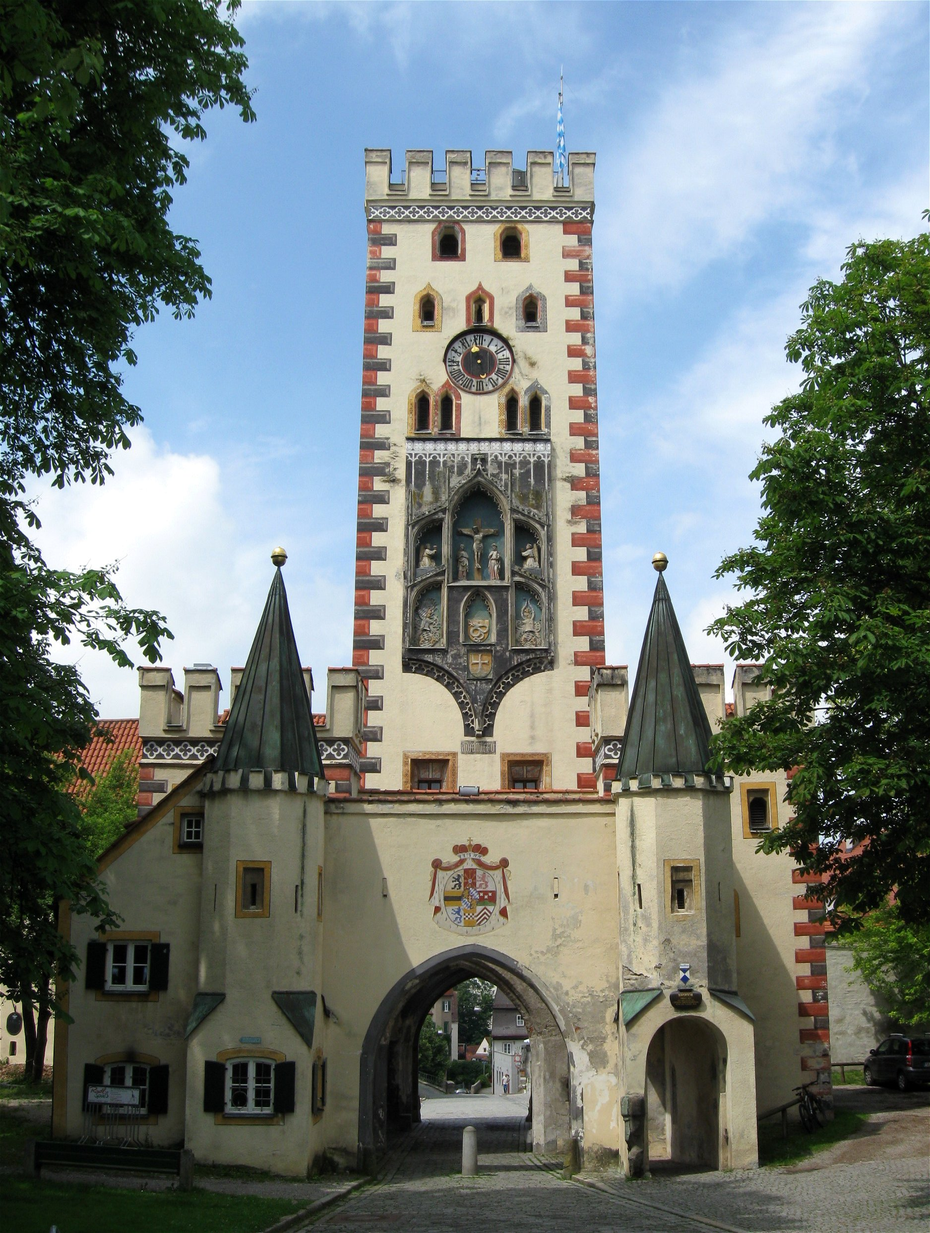 Alte Bergstraße 448; Bayertor oder Münchner Tor, Stadttor, Haupttorturm, mehrgeschossiger Turm über quadratischem Grundriss mit spitzbogig geöffneter Torhalle und Eckquaderung, bezeichnet mit dem Jahr 1425